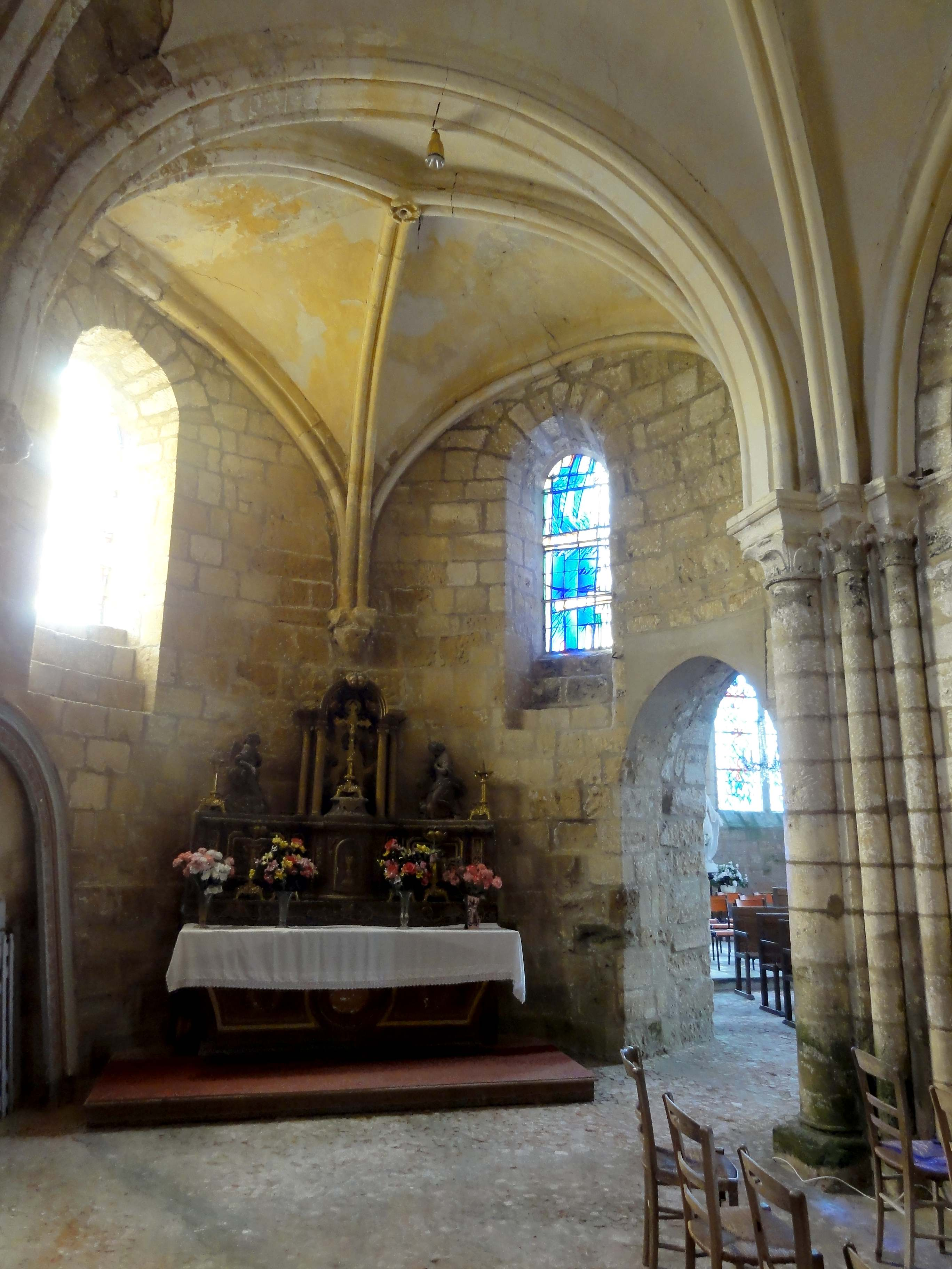 Intérieur de l'église (voir titre).